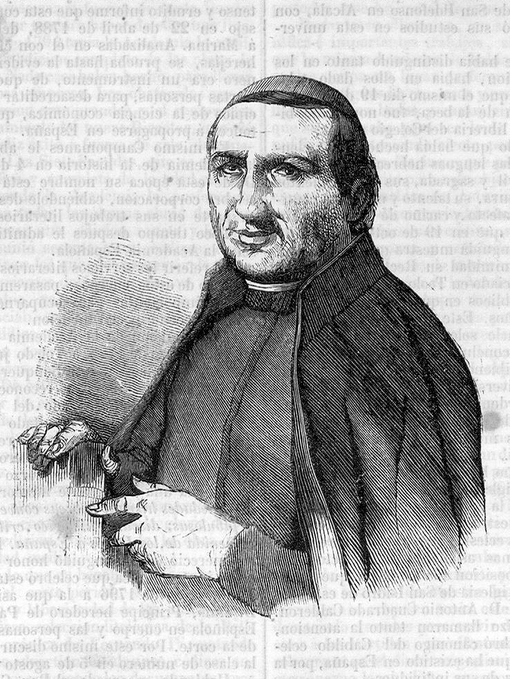 Biografía española. D. Francisco Martínez Marina.